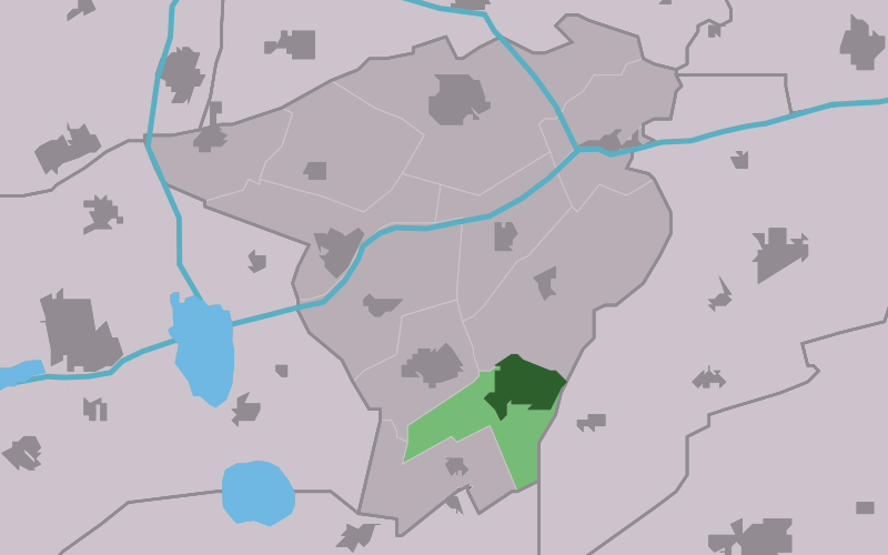 Kaartsje fan himrik fan Surhústerfean